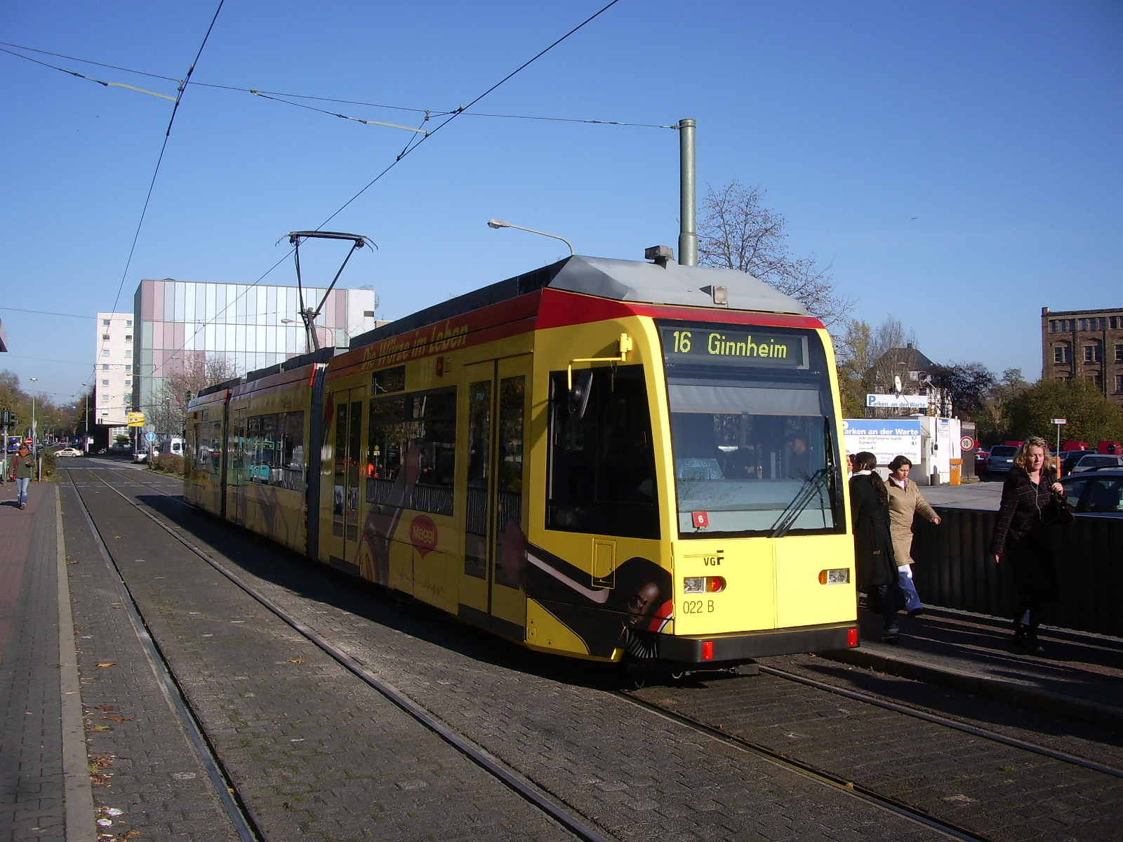 VGF tram R 022 at Bockenheimer Warte, Frankfurt am Main, November 22 2005. Photo by myself, GNU-FDL. VGF-Straßenbahnwagen R 022 an der Bockenheimer Warte, Frankfurt am Main, 22. November 2005. Selbst fotografiert, GNU-FDL.